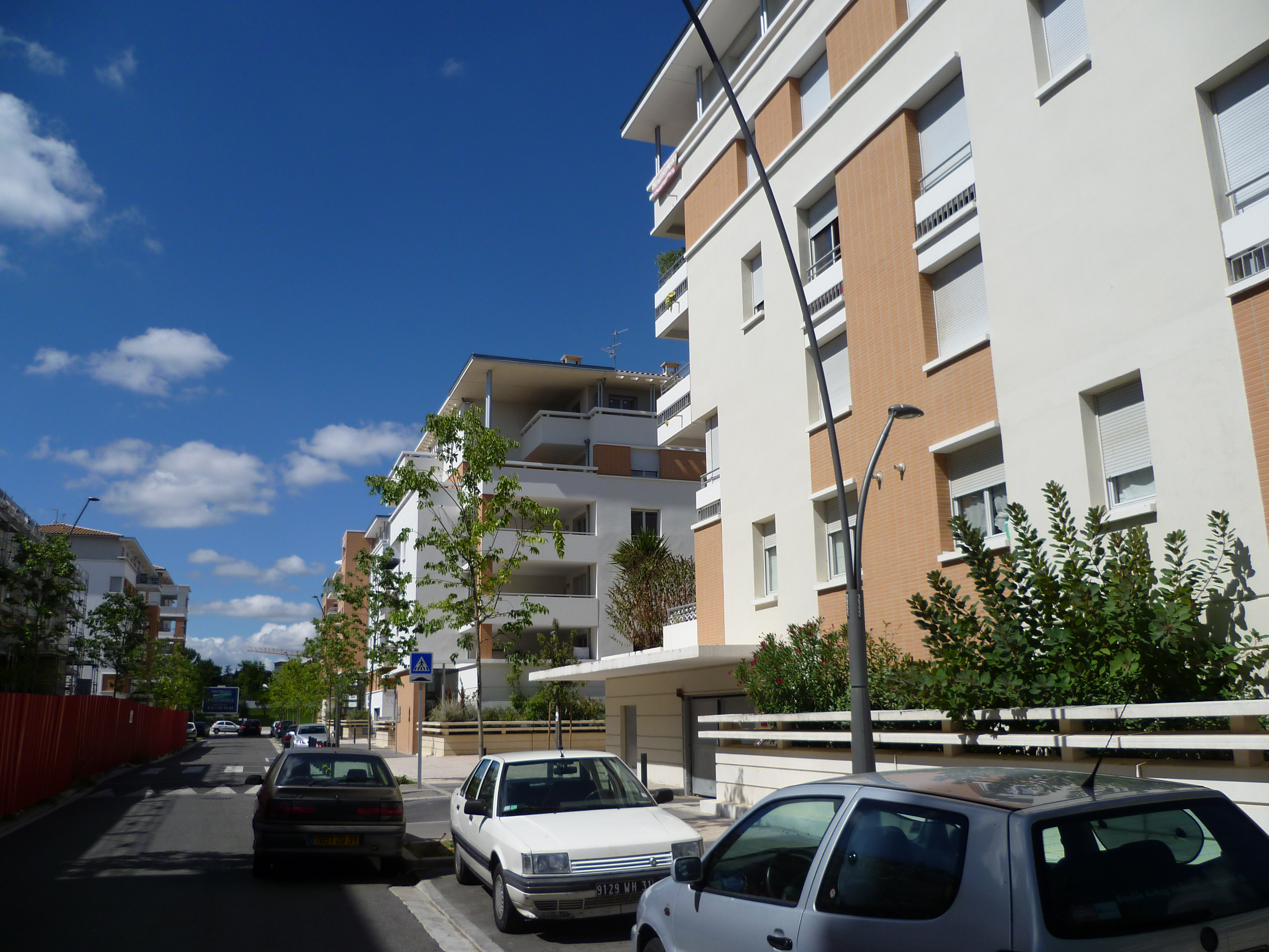 La rue Ticky Holgado à Toulouse.